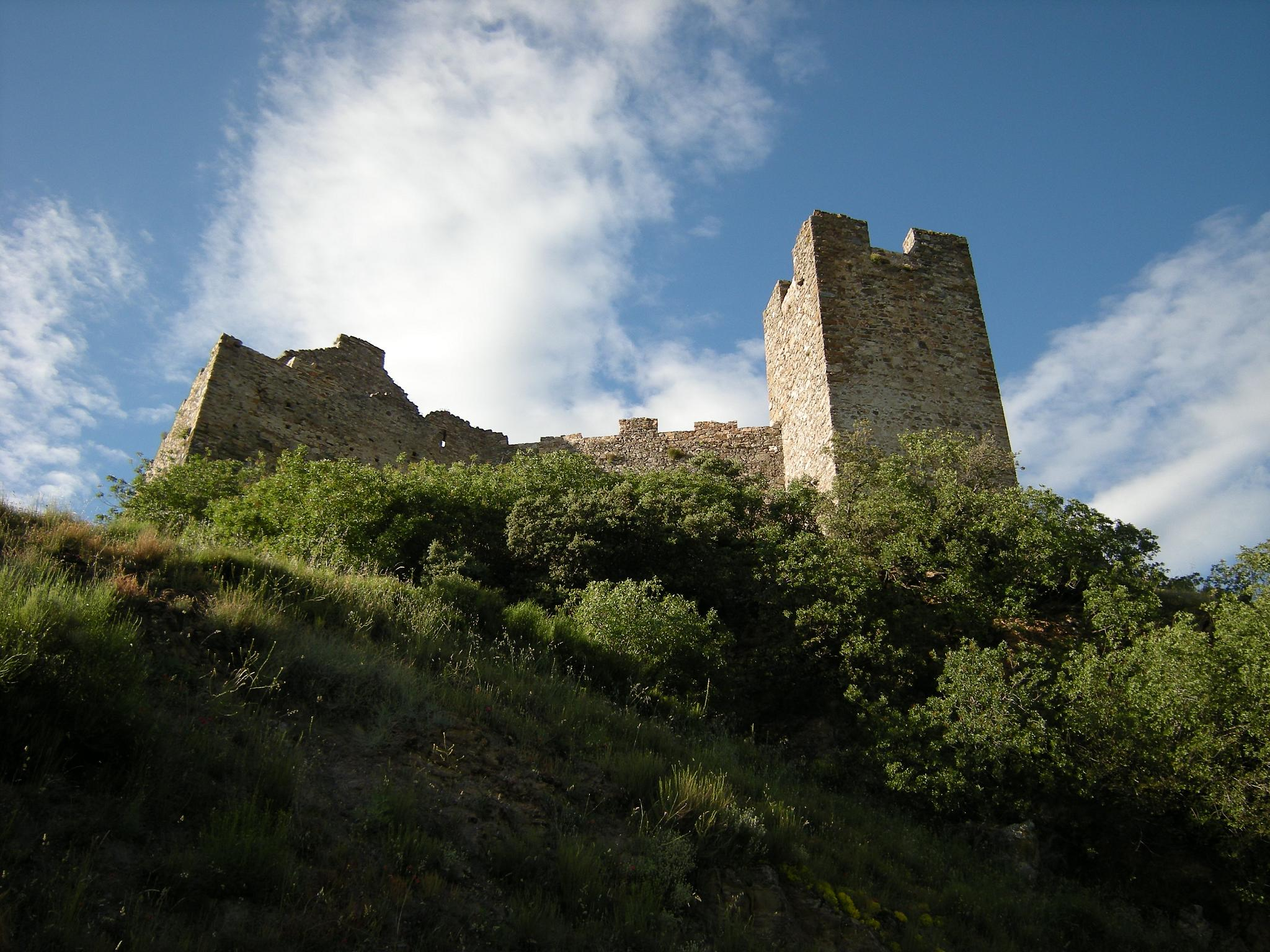 El castillo de Cornatel nació con una voluntad meramente defensiva, pero sus estructuras fueron modificándose para adaptarlas a un uso residencial, especialmente desde la mitad del siglo XV, cuando el primer conde de Lemos reconstruyó la fortaleza, seriamente dañada durante la revuelta popular de los irmandiños.